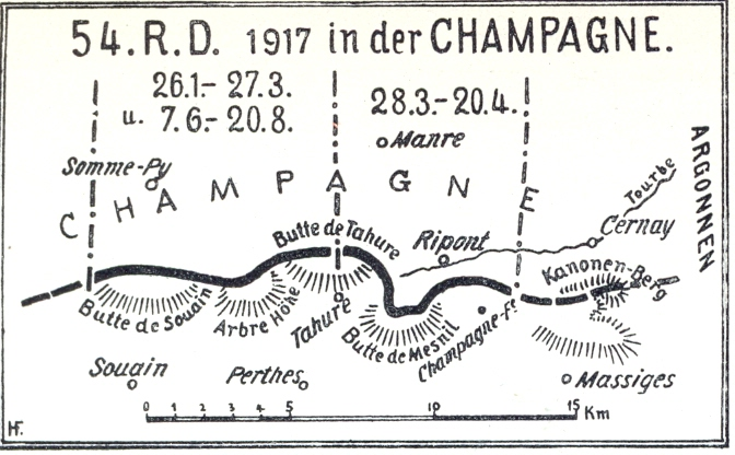 Karte: 54. R.D. 1917 in der Champagne